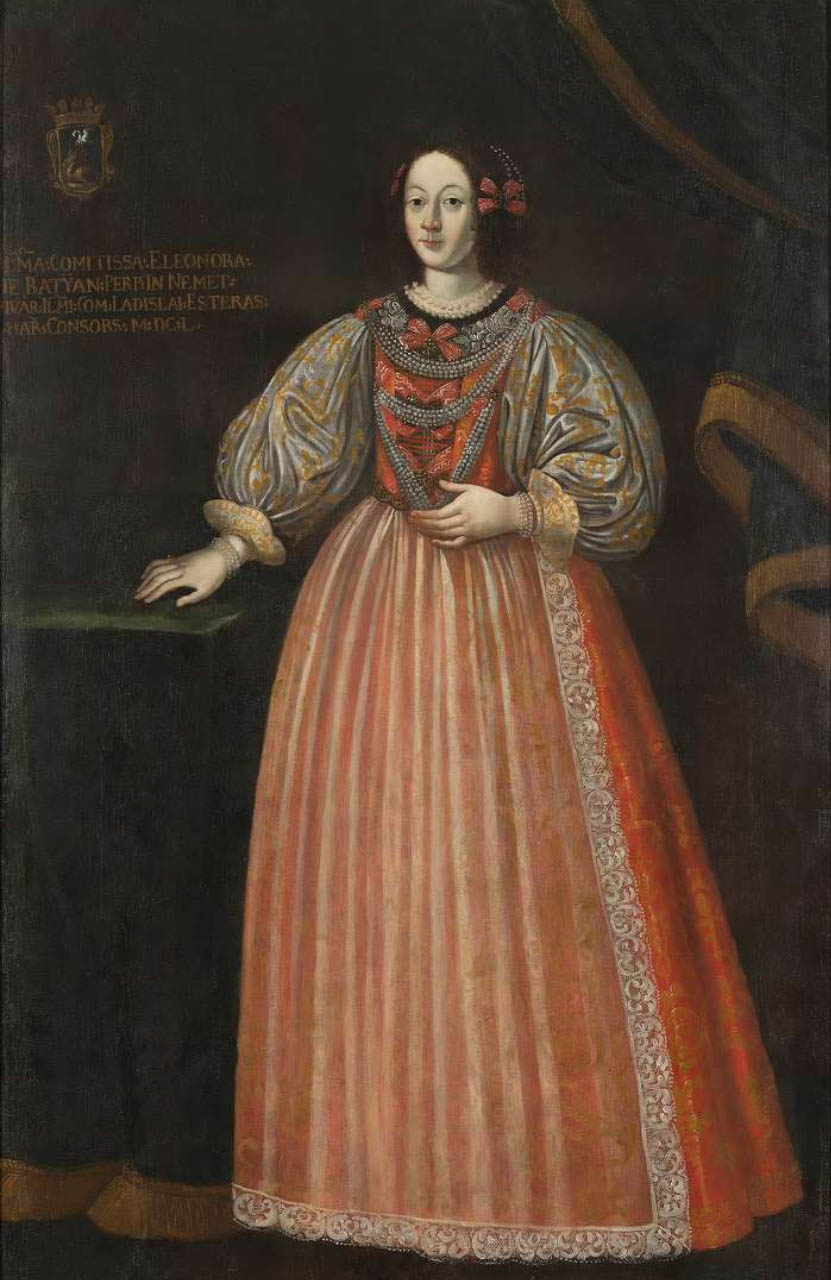 Eleonora Batthyány, Gemahlin Ladislaus Esterházys, Tochter von Ádám Batthyány Original caption: "36. GRÓF ESTERHÁZY LÁSZLÓNÉ, BATTHYÁNY MÁRIA ELEONORA." (on source webpage)